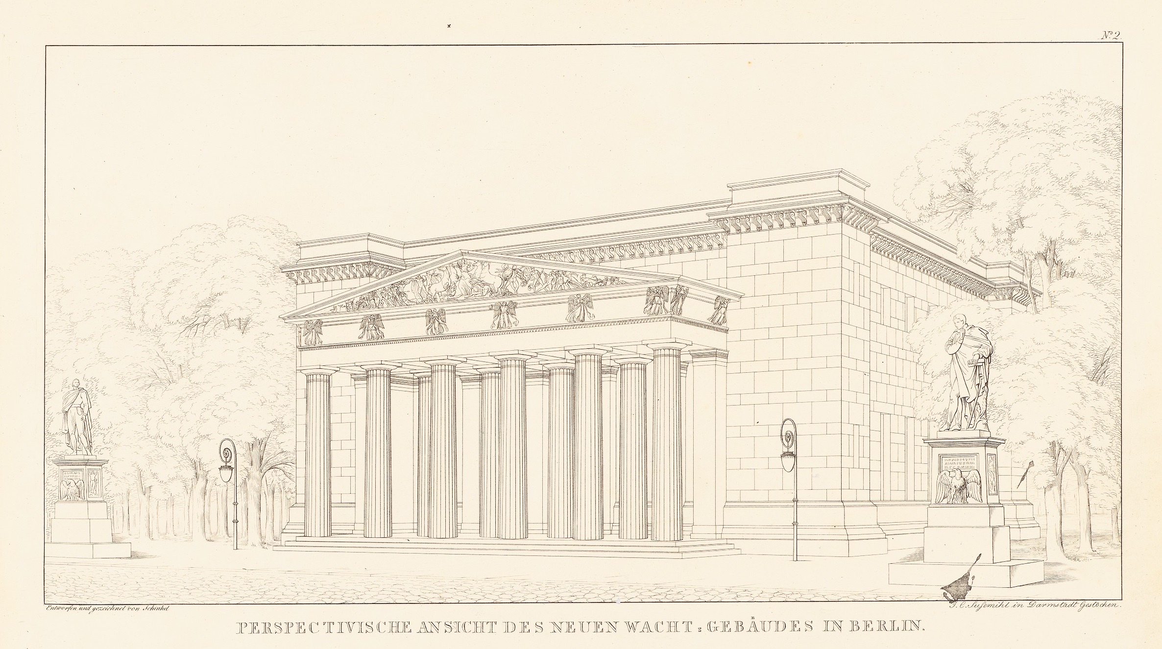 Neue Wache (Königswache), Berlin. Perspektivische Ansicht